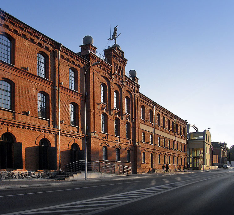 Białystok, ul. Świętojańska 15 - dawna fabryka pluszów, później Fabryka Wyrobów Runowych „Biruna” SA, obecnie Alfa Centrum Białystok (zabytek nr 361 z 20.06.1975)